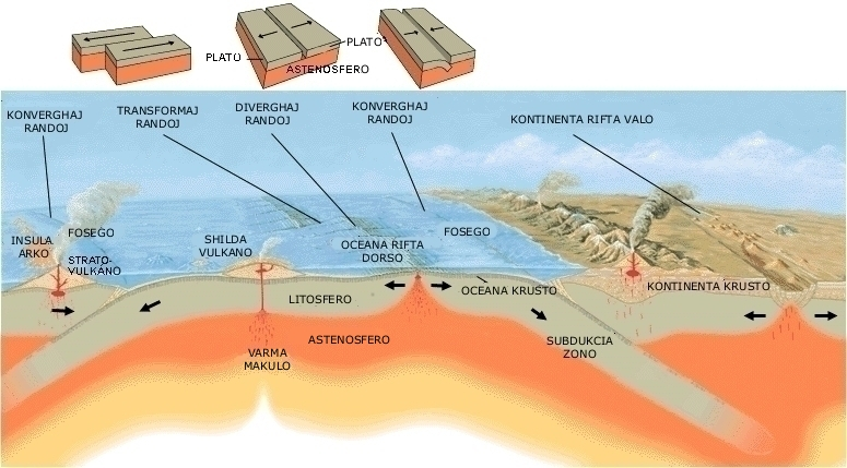 Vidu la francan dosieron :fr:Fichier:Shema plaques tectoniques.png ("Okraje tektonickych platni.png")